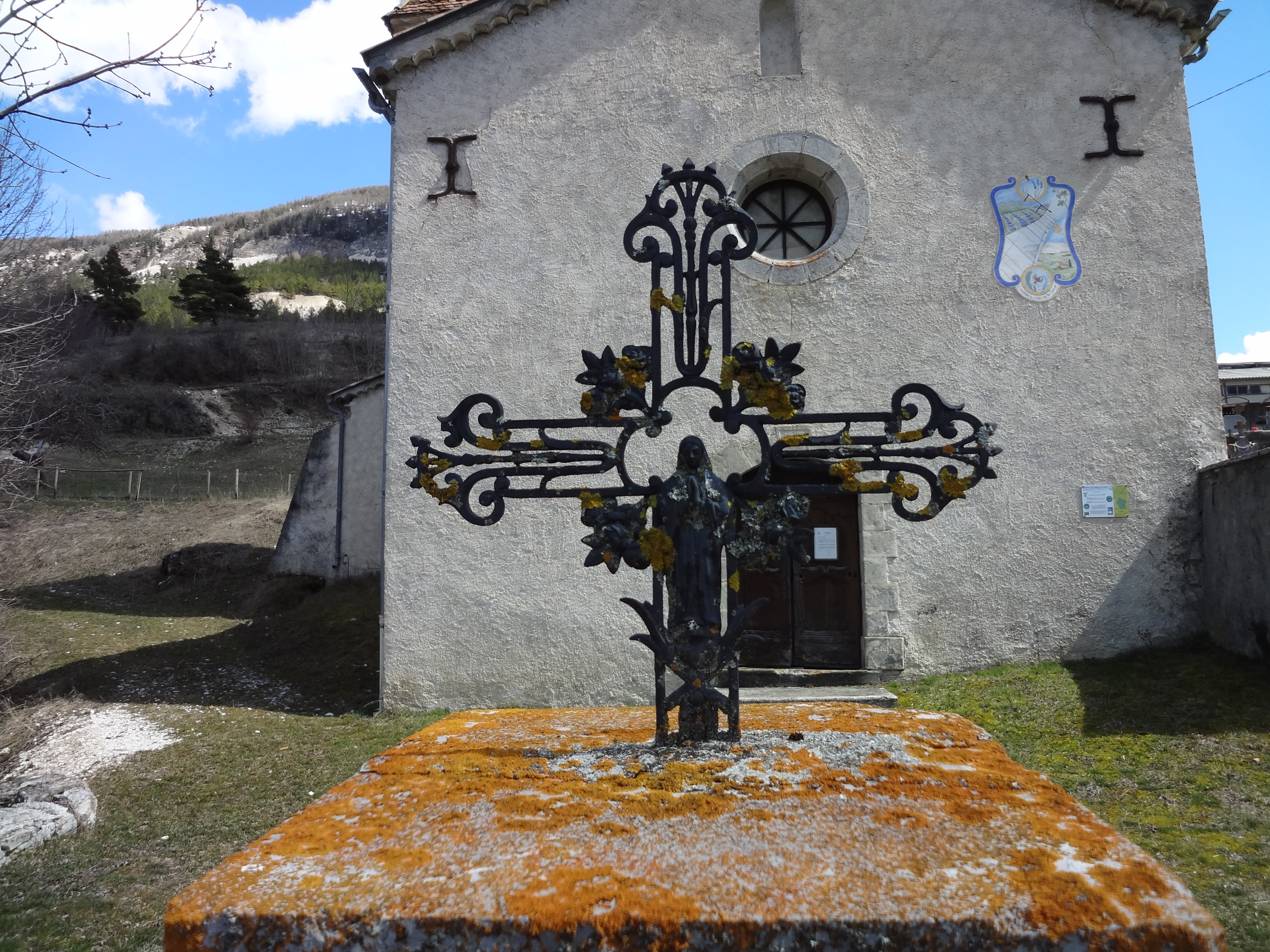 en fer forgé, avec la Vierge Marie